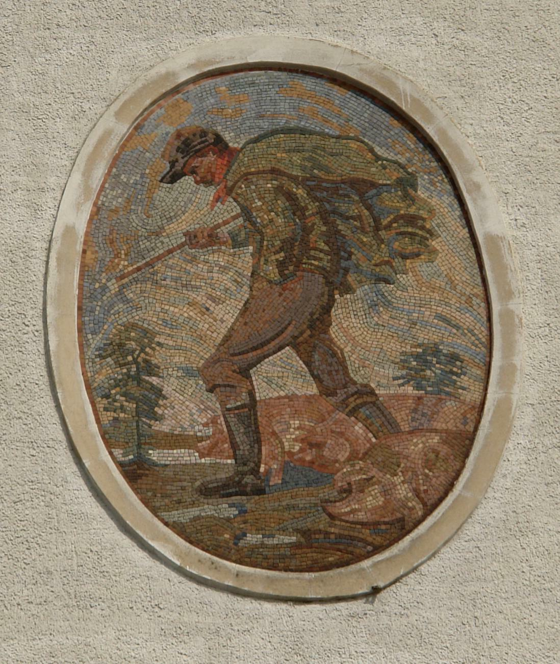 Mosaik Bauer mit Säuen im Städtischen Vieh- und Schlachthof (Dresden)